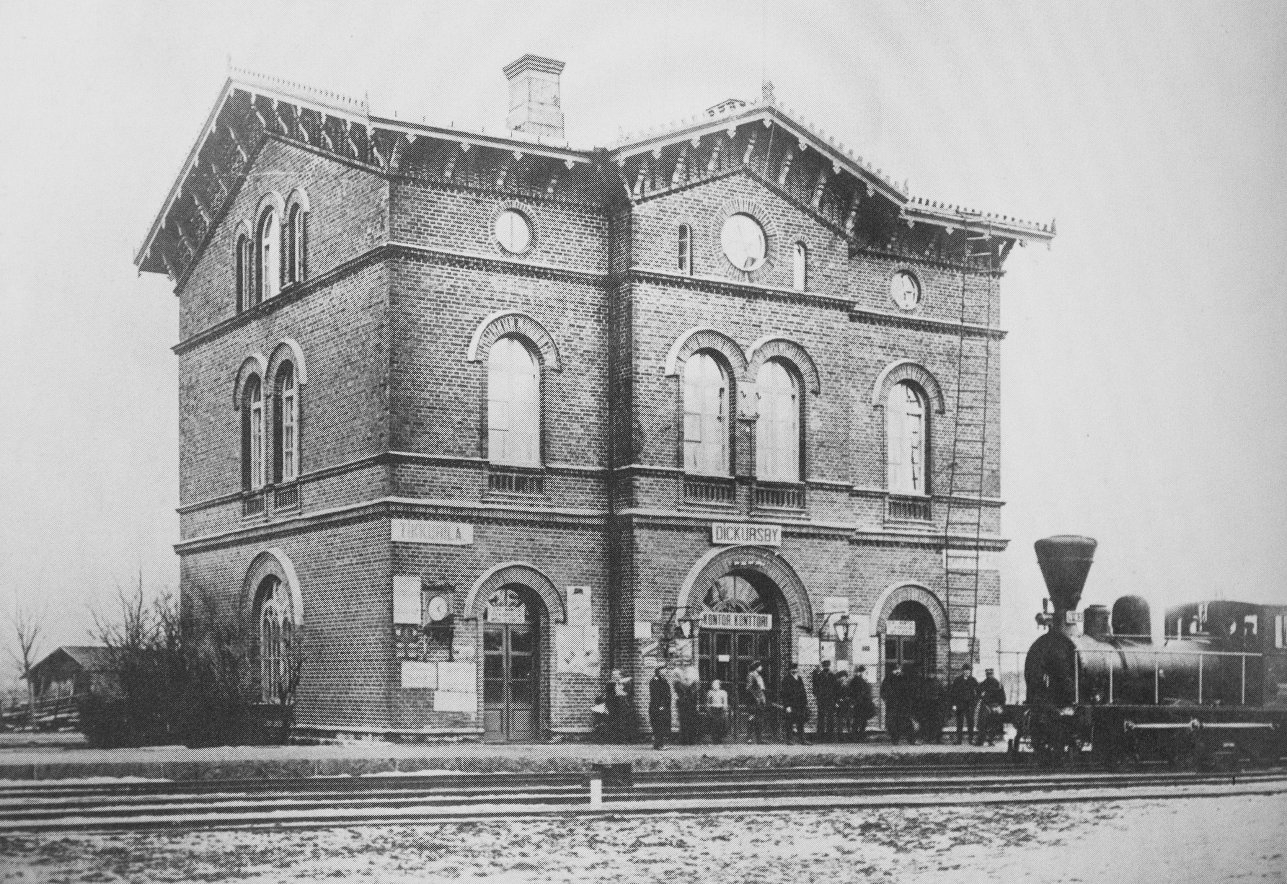 Tikkurilan rautatieasema